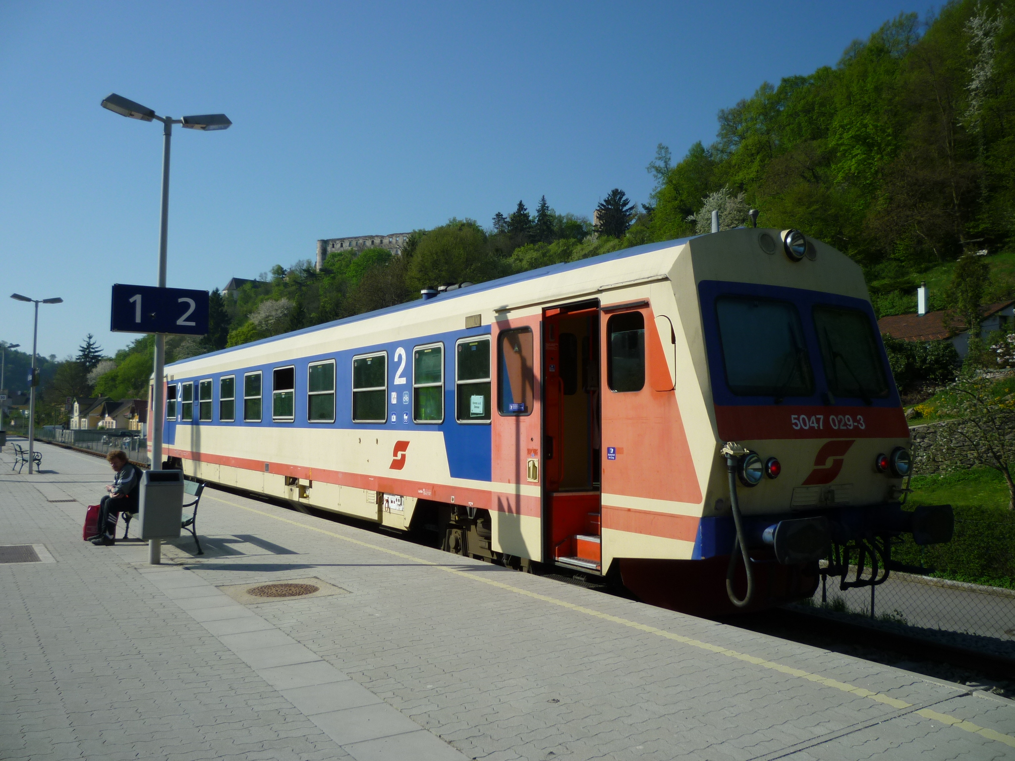 Triebwagen 5047 der Österreichischen Bundesbahnen im Bahnhof Gars-Thunau.